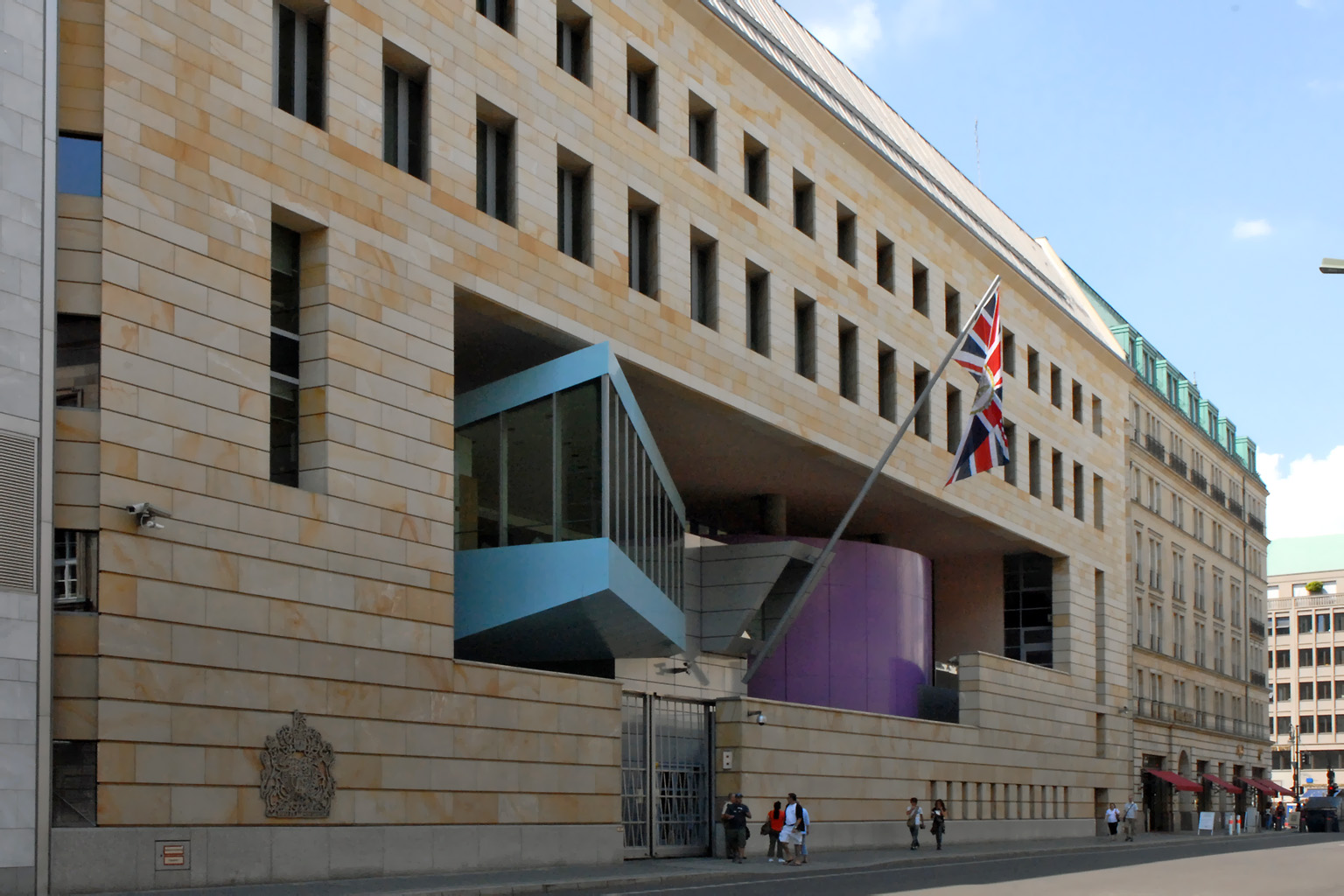 L'Ambassade du Royaume-Uni (Berlin) a été conçue par l'architecte : Michael Wilford (Londres) 1999-2000. La façade est en grès, les baies des fenêtres sont construites en oblique, et les aménagements métalliques de l'entrée sont remarquables.